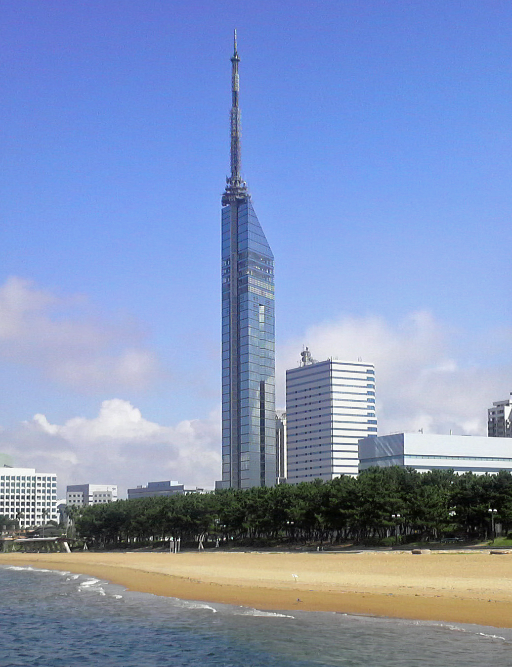 福岡市早良区百道浜のシーサイドももち海浜公園